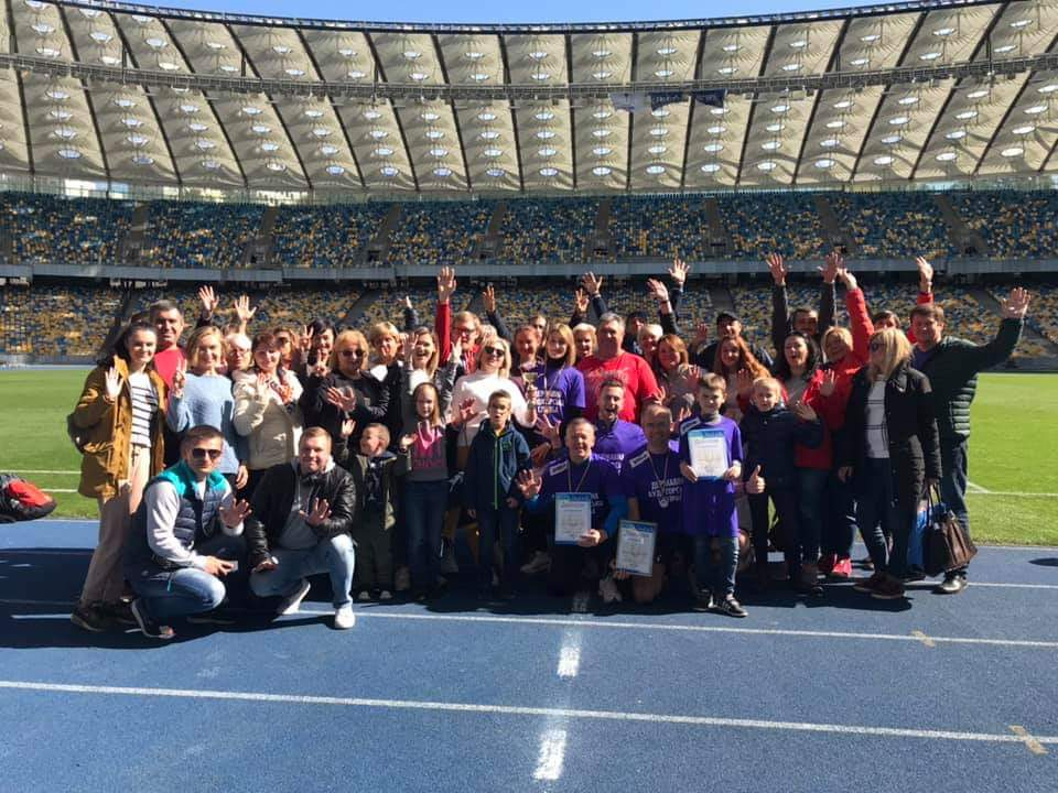 фото команди Держаудитслужби на відкритті спартакіади 2019 року